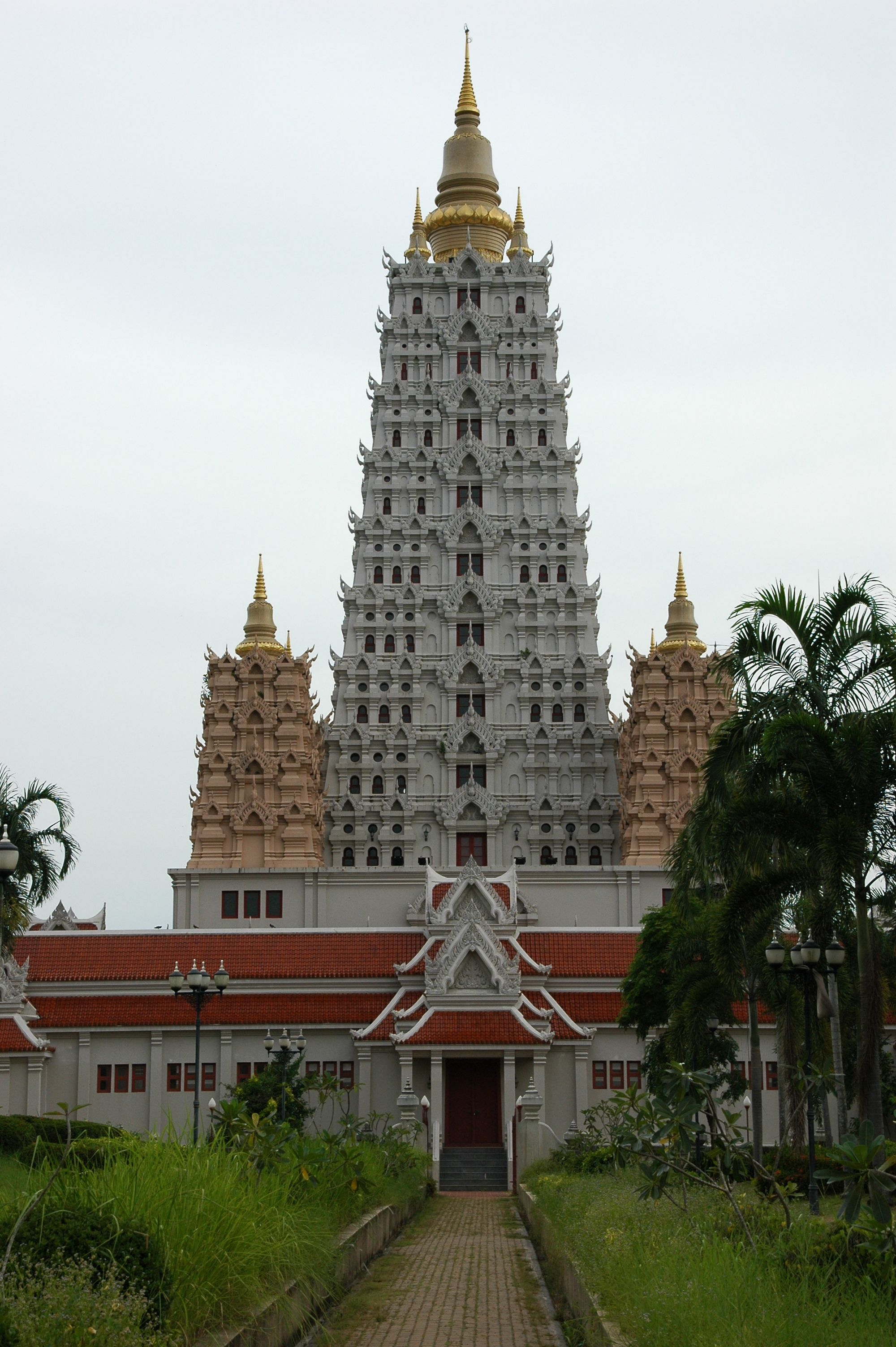 Wat Yansangwararam, Chonburi, Thailand